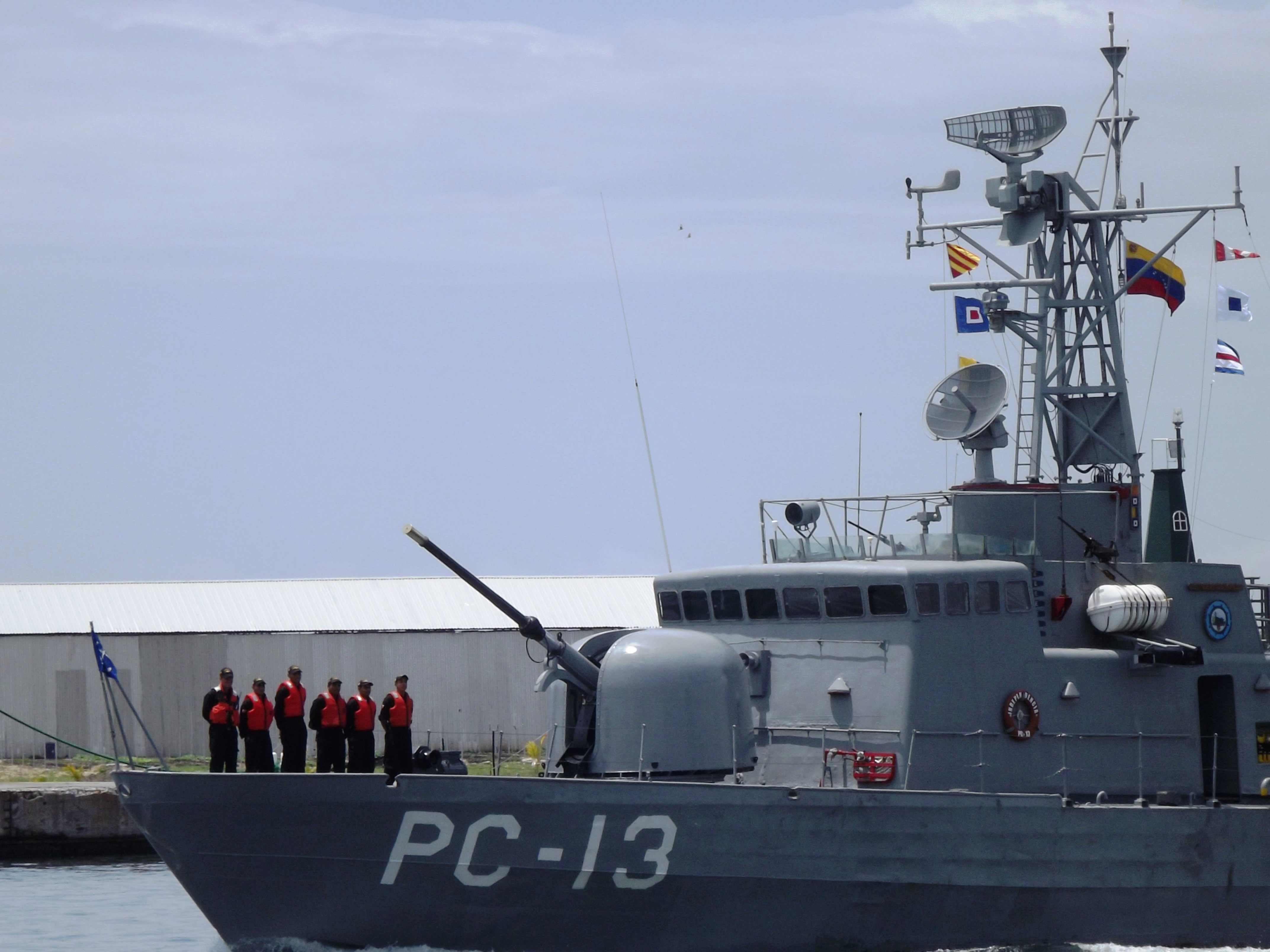 Patrullero PC-13 Independencia Vosper 37m.Clase Constitución